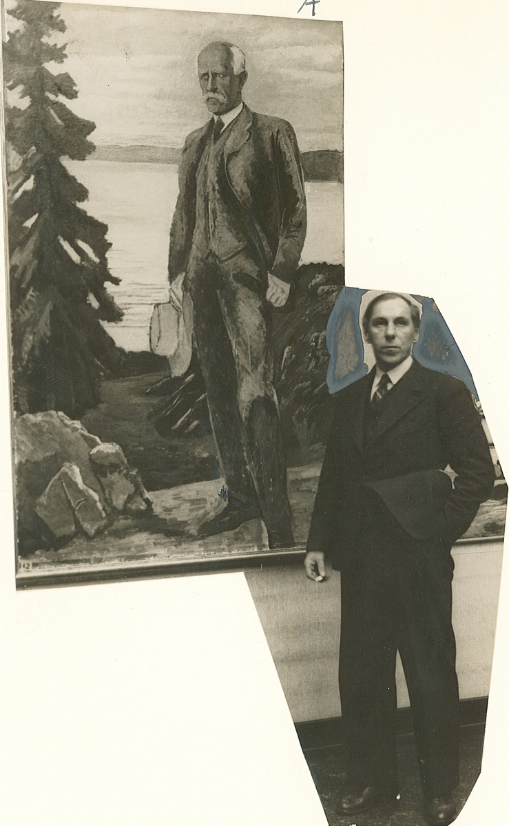 Axel Revold med sitt portrett av Fridtjof Nansen, ca. 1935. Ukjent fotograf. Fra Byhistorisk samling hos Oslo Museum.